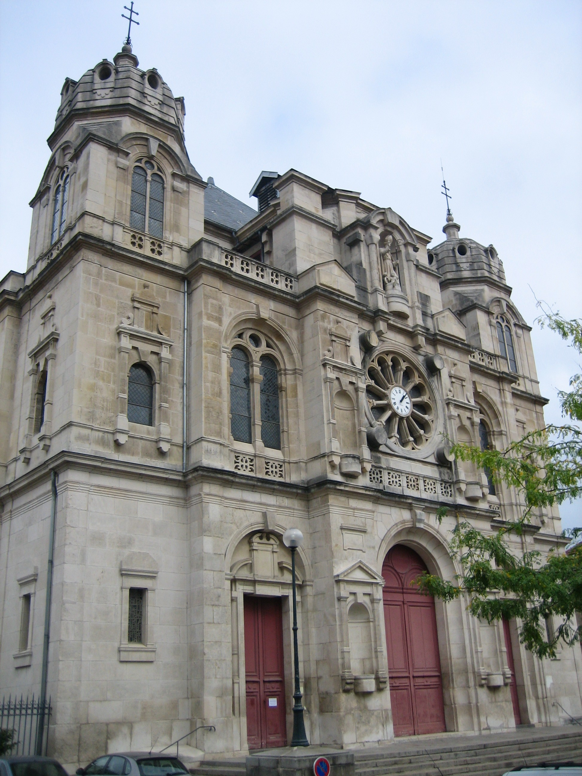 Façade de l'église Saint-Nicolas de Nancy par Raphaël Tassin (raphdvoj) le 16/9/2006